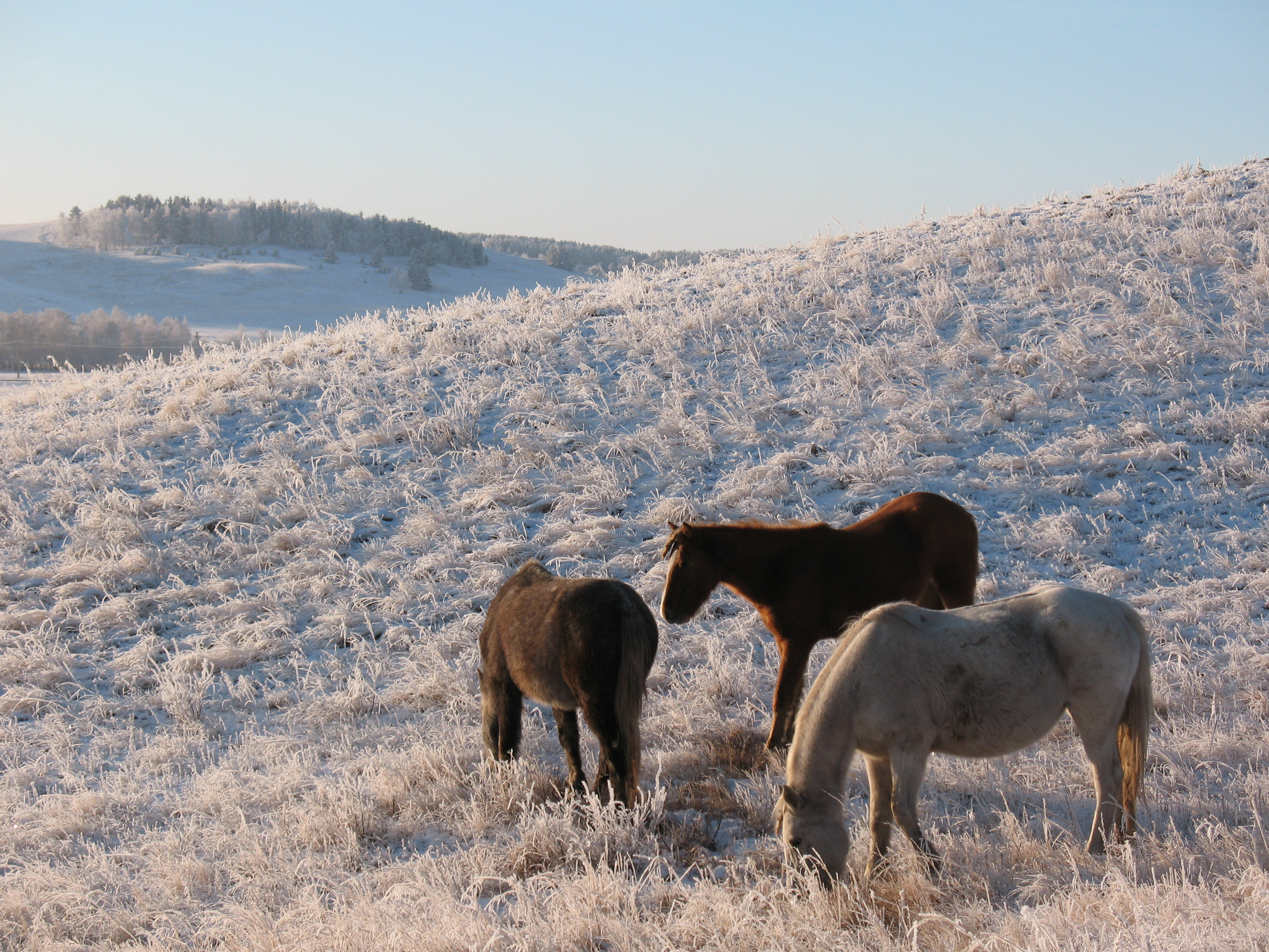 Казахстан, Кокшетау